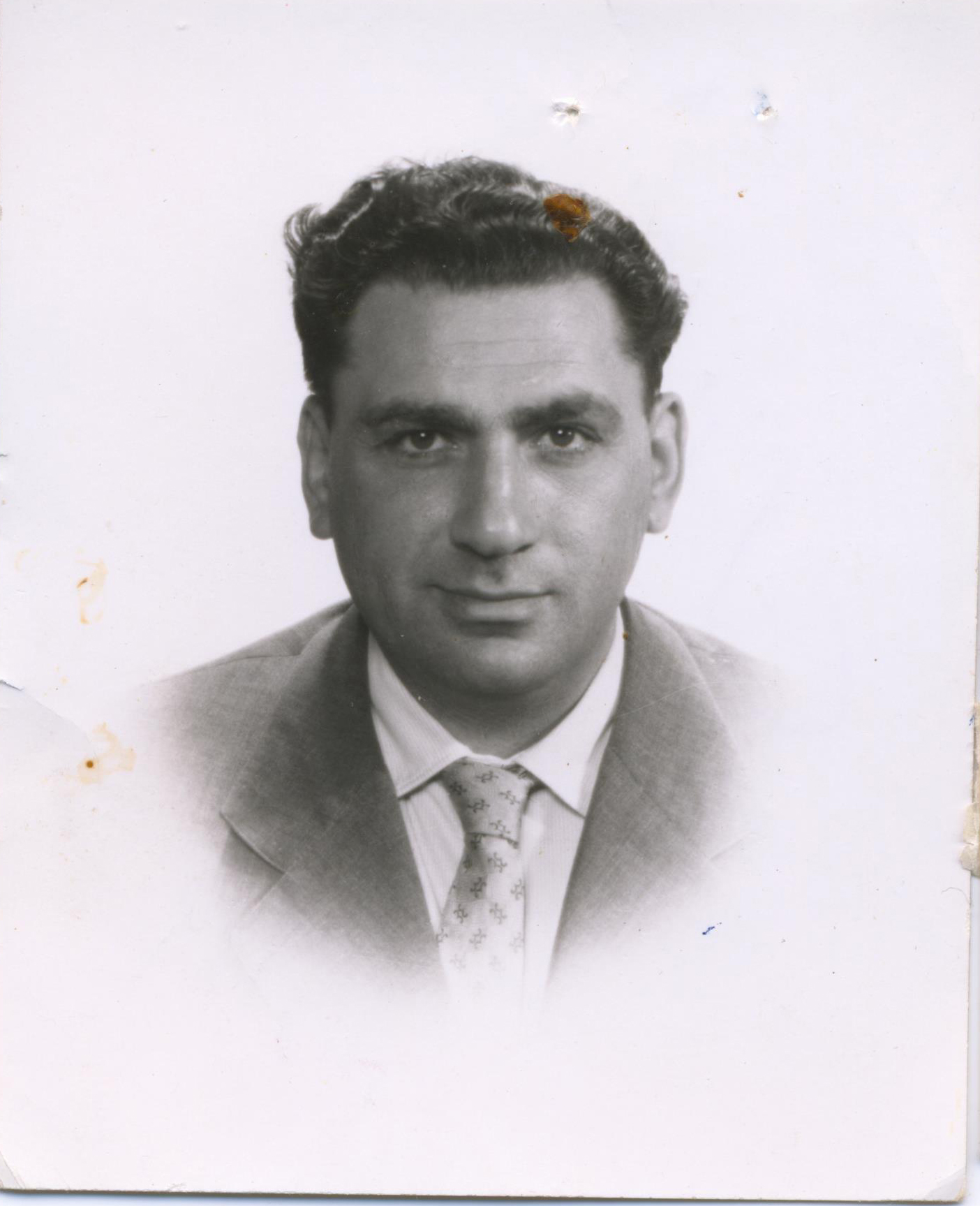 תמונת פרופיל של יעקב בן-יהודה